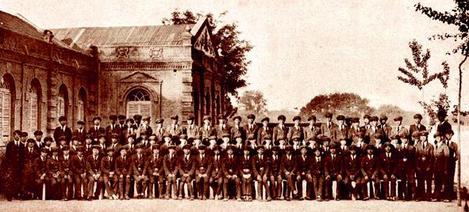 中文（中国大陆）: 1934年，农学系全体毕业生合影